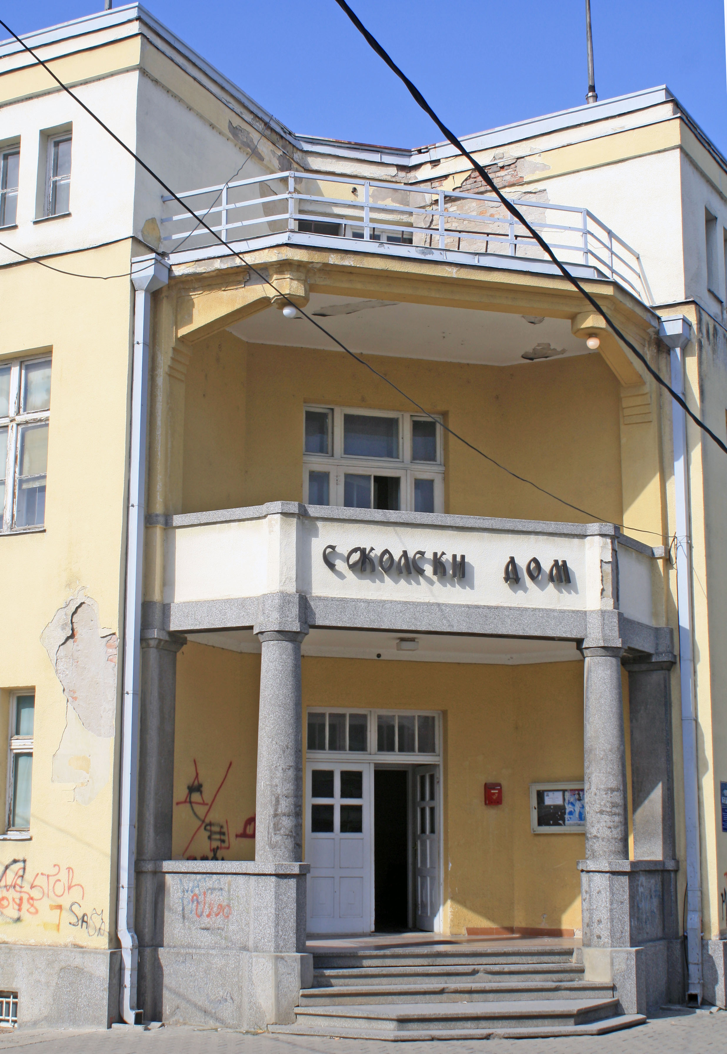 Зграда Соколског дома у Шапцу, угао улица Косте Абрашевића и Милоша Обилића.